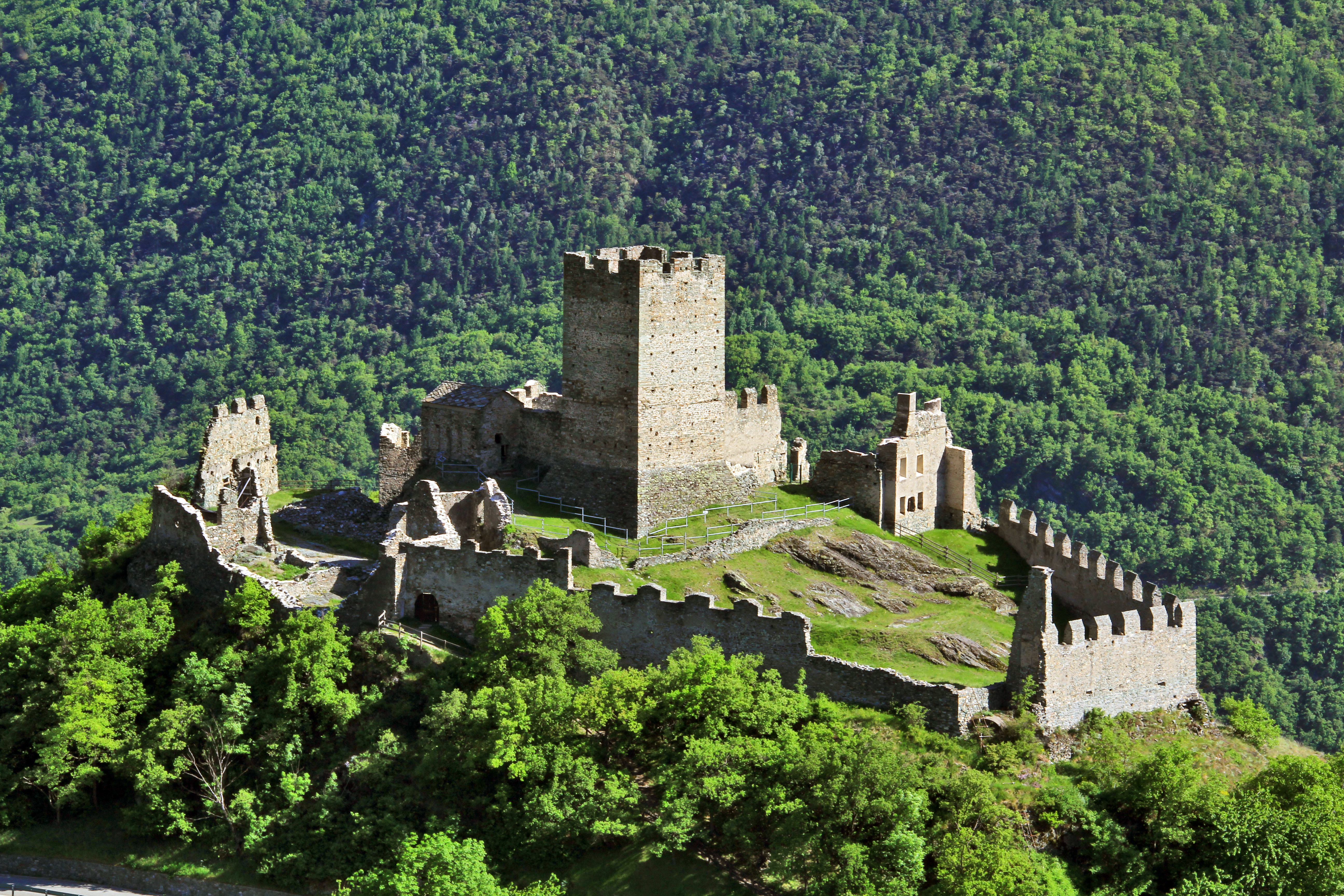 Castello di Cly This is a photo of a monument which is part of cultural heritage of Italy.